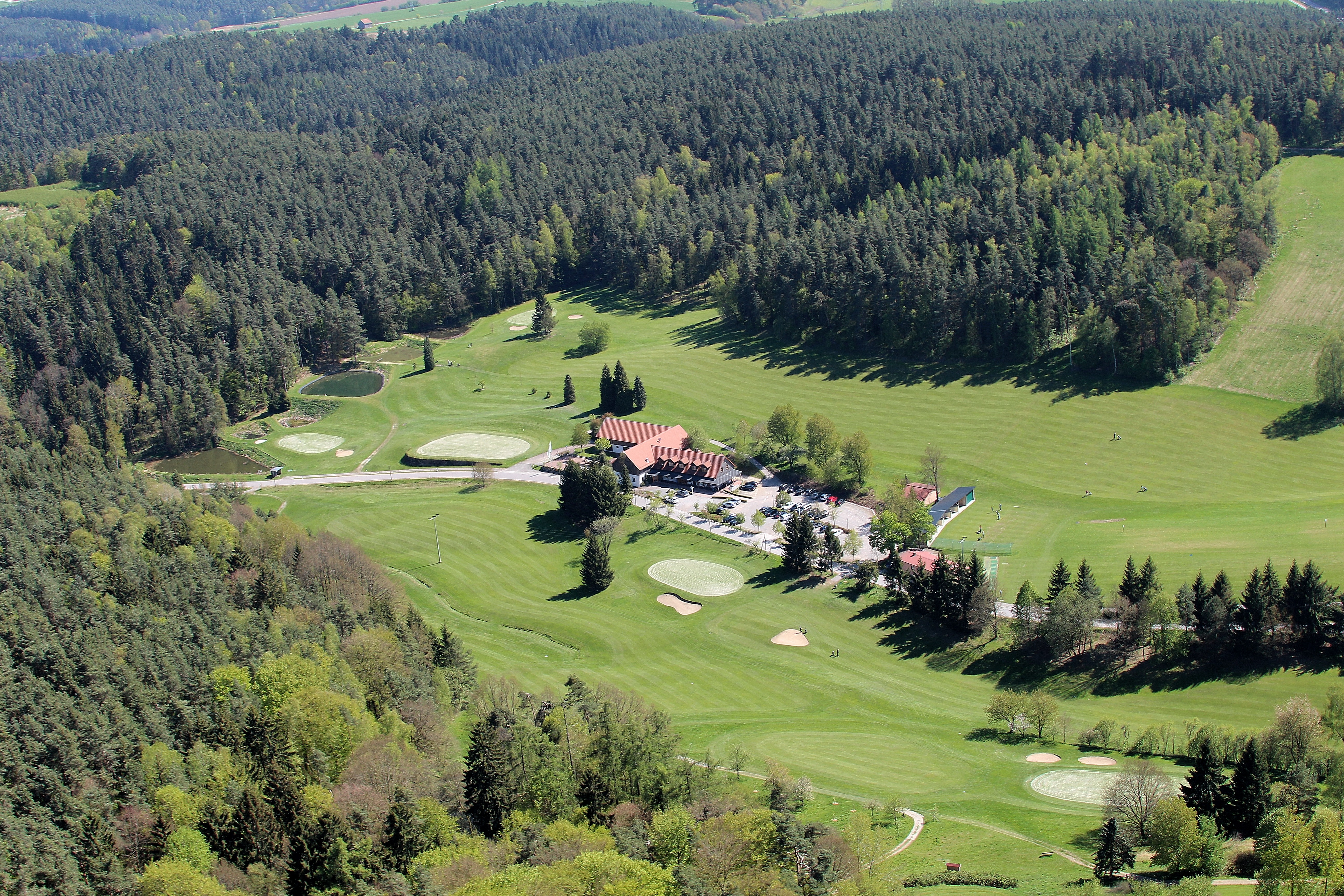 Golfplatz Oedengrub, Stadt Neunburg vorm Wald, Landkreis Schwandorf, Oberpfalz, Bayern